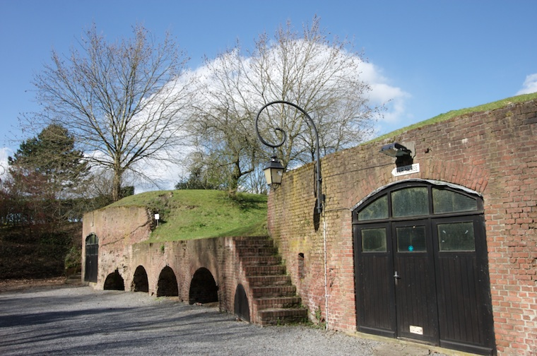 Musée de la résistance de Bondues (Nord)